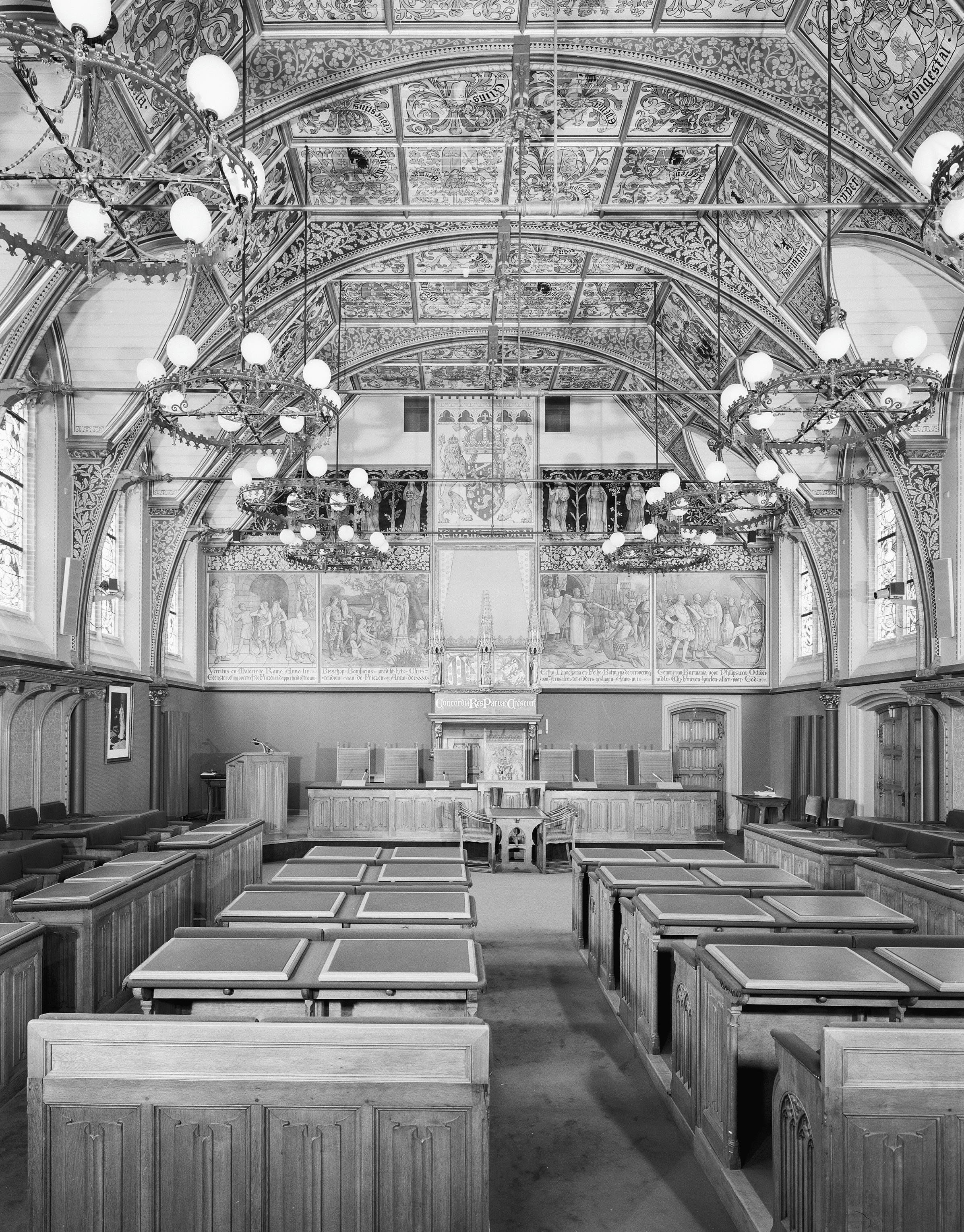 Provinciehuis: Interieur, overzicht statenzaal met polonceauspanten en wapens, provinciehuis (opmerking: Gefotografeerd voor Monumenten In Nederland Friesland, bladzijde 202)